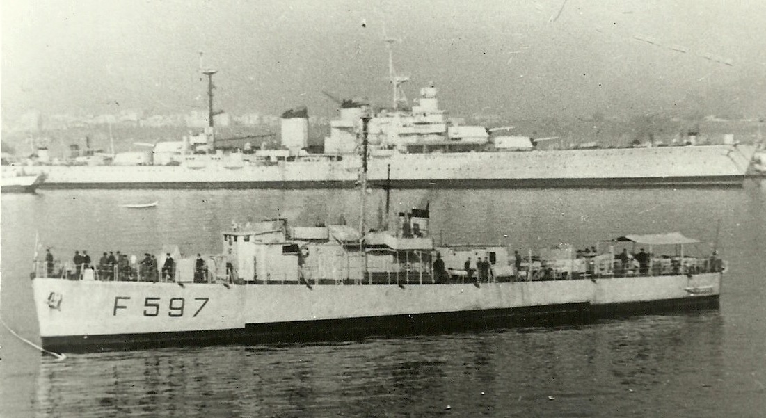 Corvetta antisommergibile "Vedetta" (F597), residuato bellico della US Navy originariamente destinata all'Etiopia, in servizio in Italia dal 1959 al 1978.